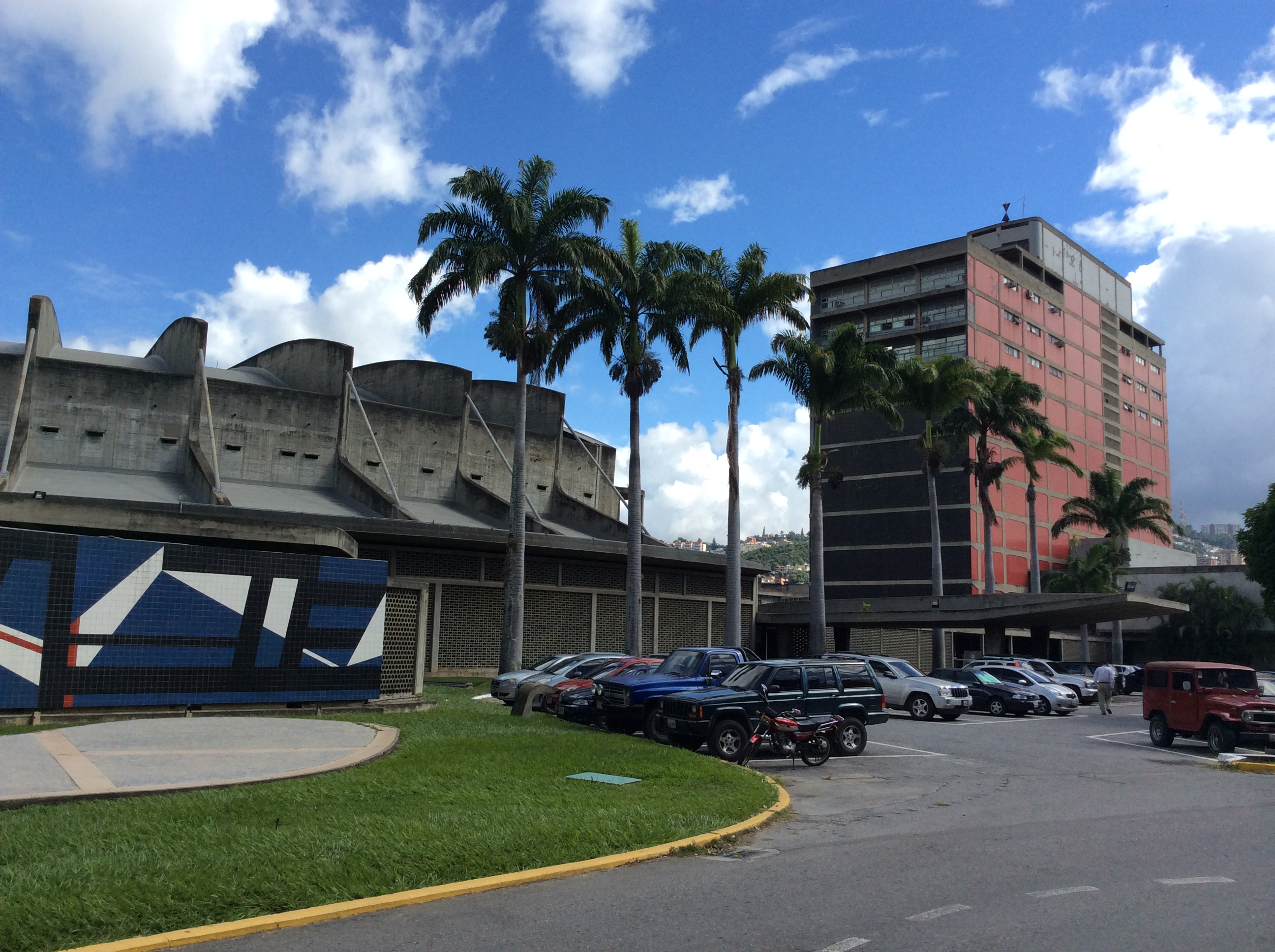 Conjunto integrado por la Plaza del Rectorado, el Edificio de Comunicaciones, el Edificio del Rectorado, la Plaza Cubierta, el Paraninfo, el Aula Magna, la Sala de Conciertos, la Biblioteca Central, la Torre de enfriamiento y Tierra de nadie. Durante el recorrido se aprecia la integración de las artes con la presencia de murales, esculturas y vitrales, la presencia de vegetación y efectos lumínicos creados por el uso de cerramientos distintos en concreto. En la foto se aprecia la Torre de la Biblioteca Central (edificio de la derecha), un cuerpo de Chaguaramos que adorna el paisaje y la parte externa del Aula Magna (edificio de la izquierda).